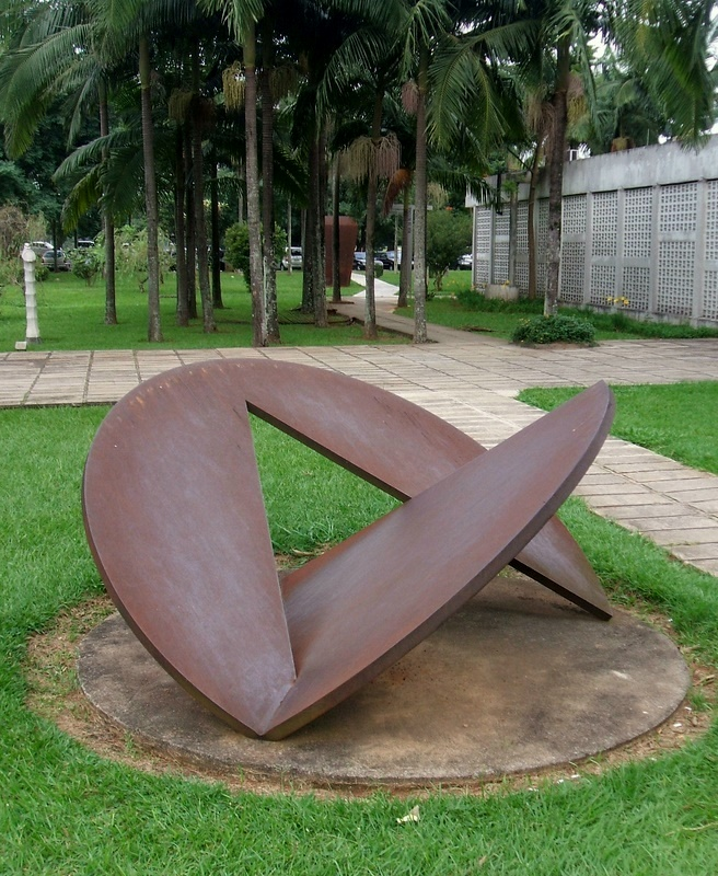 Escultura de Amílcar de Castro (1920-2002), em frente ao anexo do Museu de Arte Contemporânea da Universidade de São Paulo